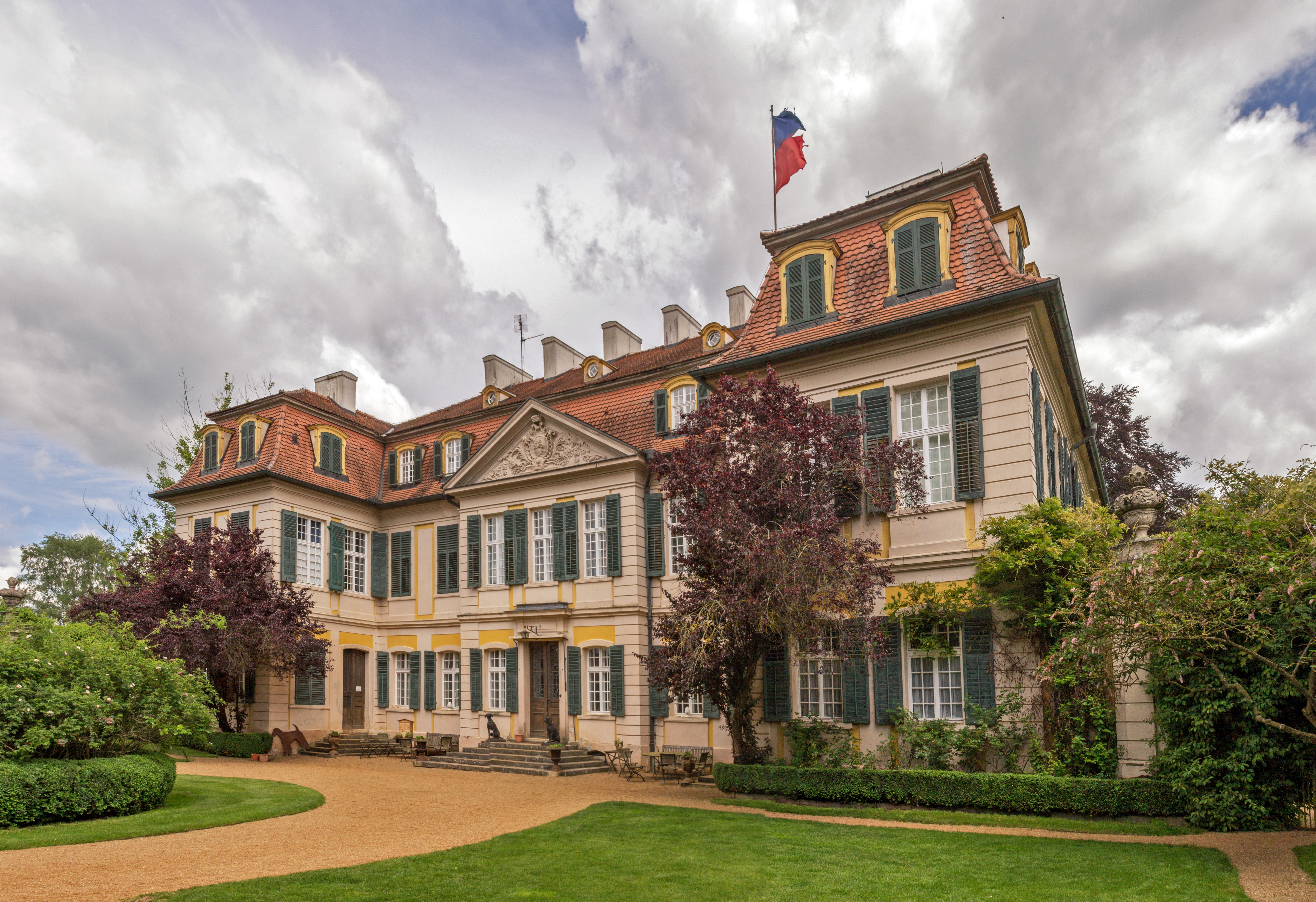 Dennemlohe, Schloss DennenloheThis is a photograph of an architectural monument.